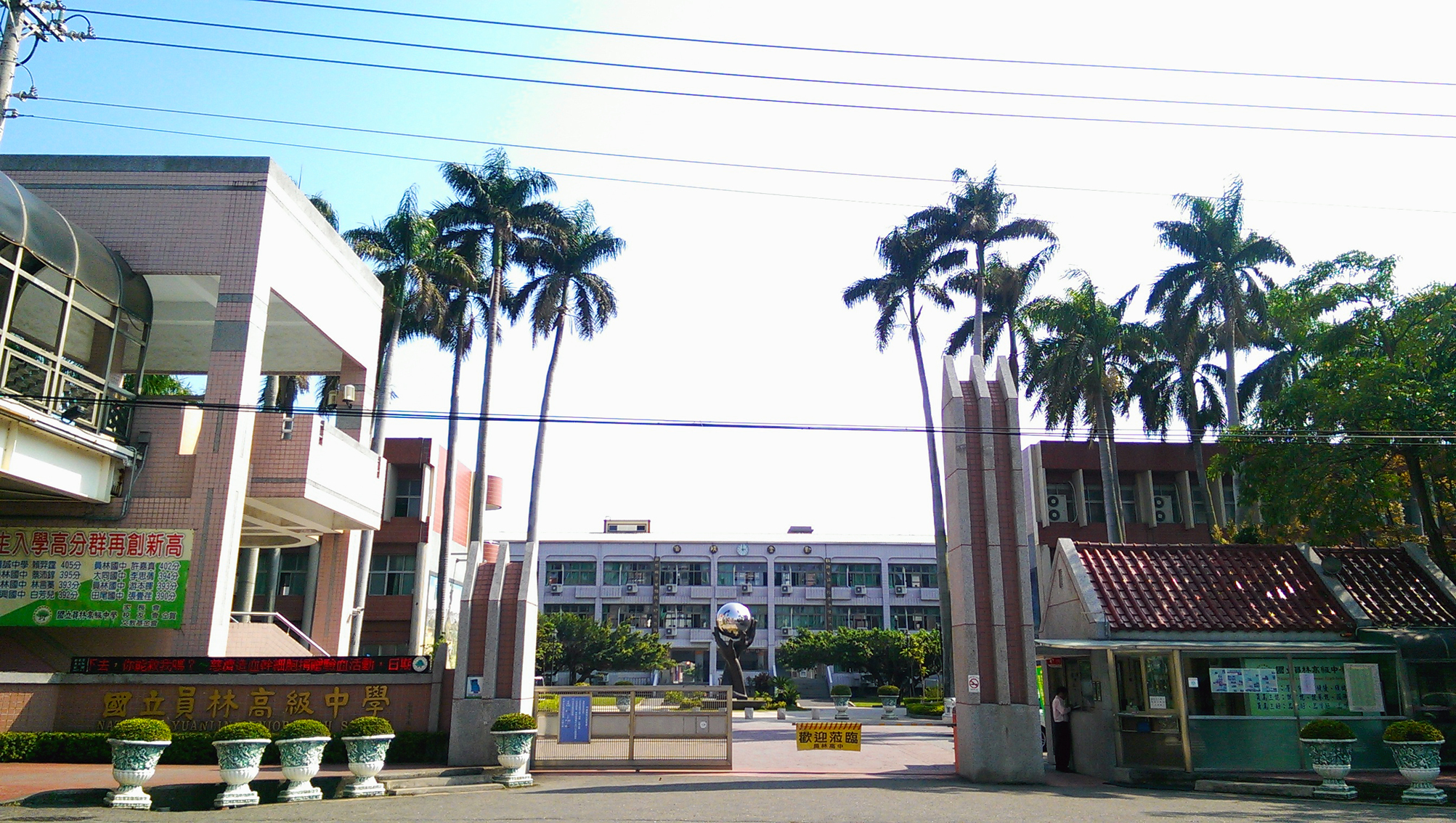 中文（台灣）: 國立員林高中